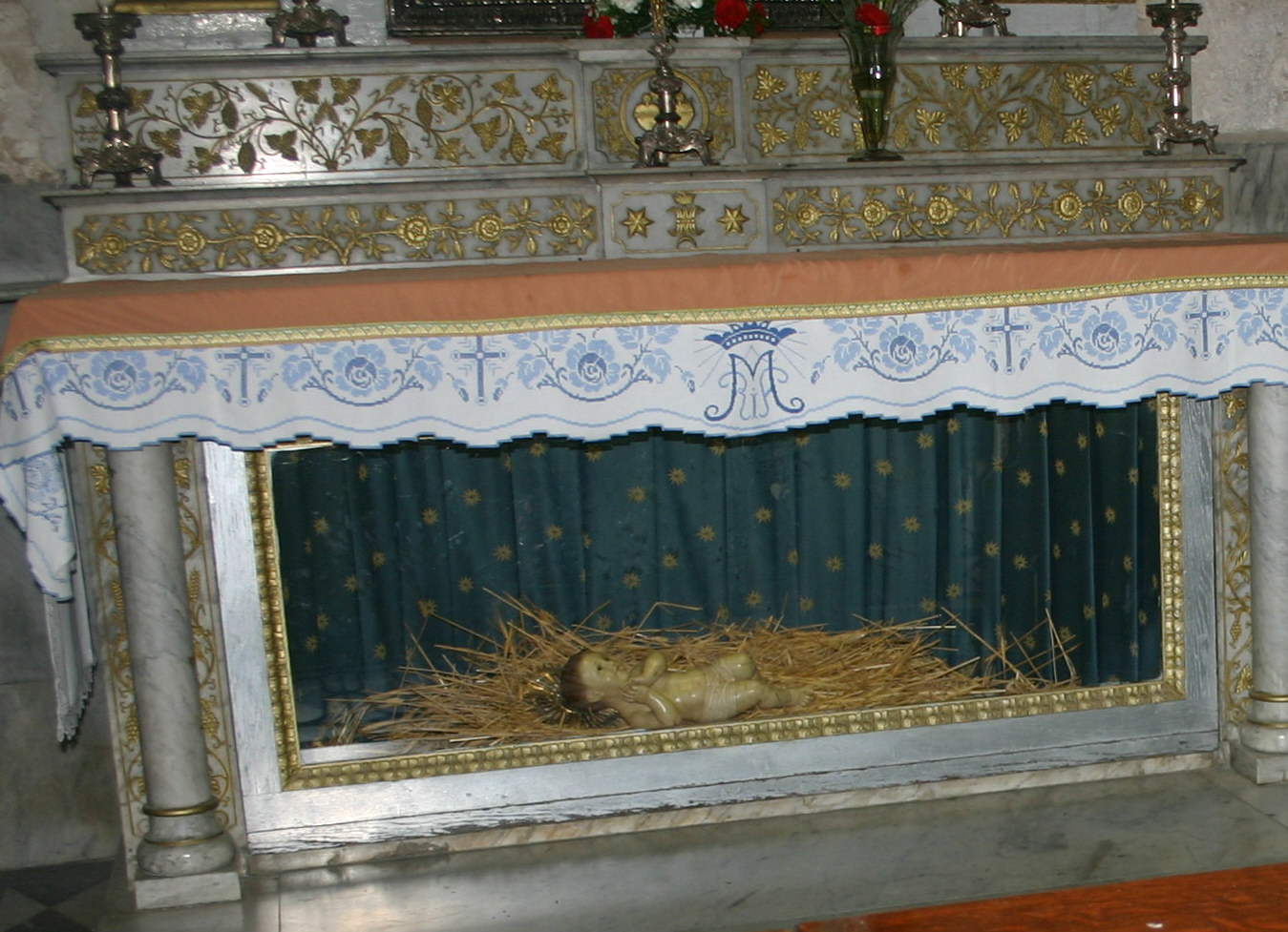 Bethlehemer Jesuskind in der Katharinenkirche